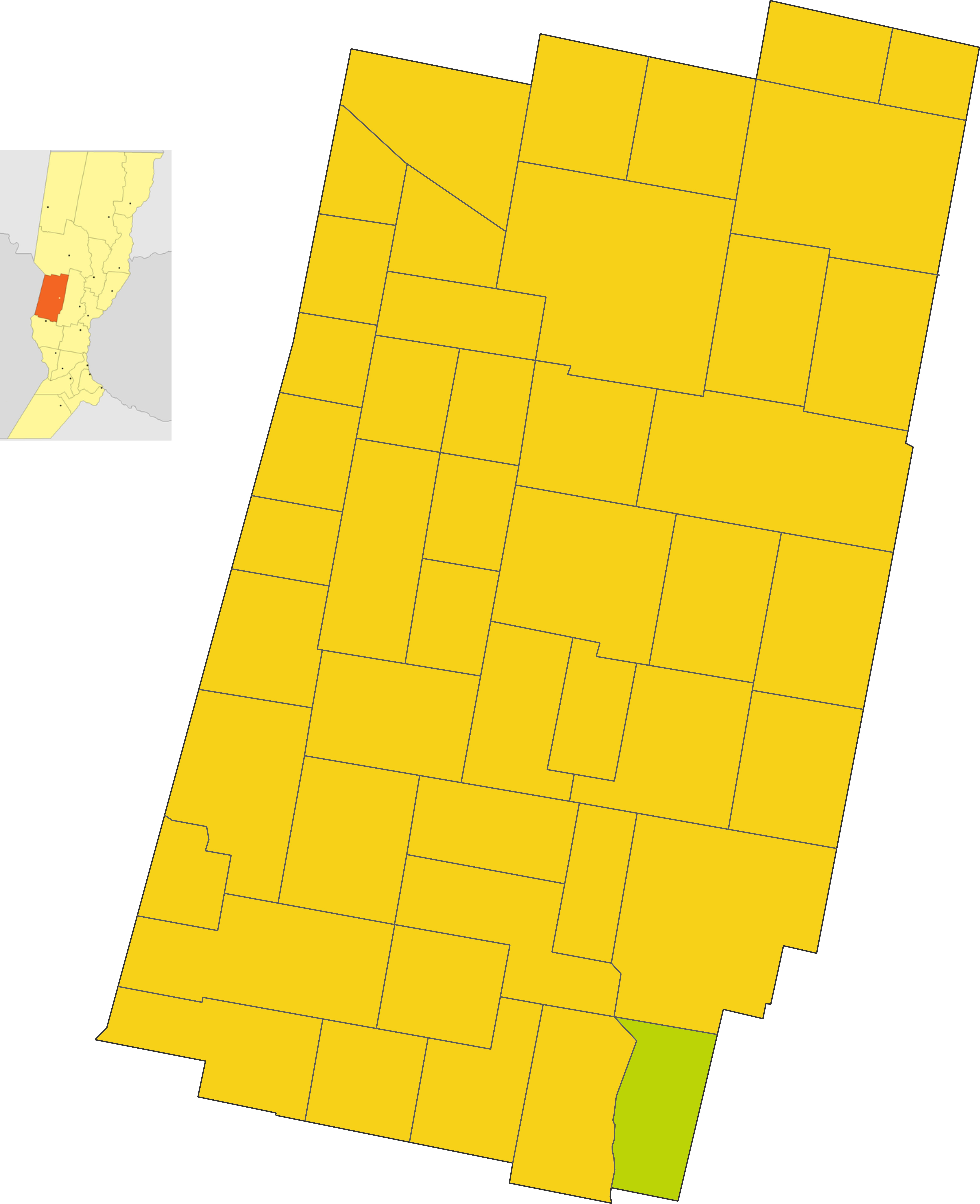 Map of the comuna de San Vicente in Castellanos department, Santa Fe province, Argentina